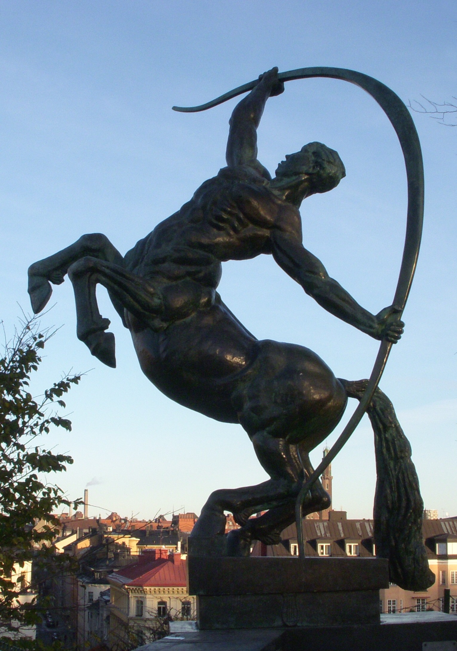 "Kentauren" skulptur på Observatoriekullen av Sigrid Fridman